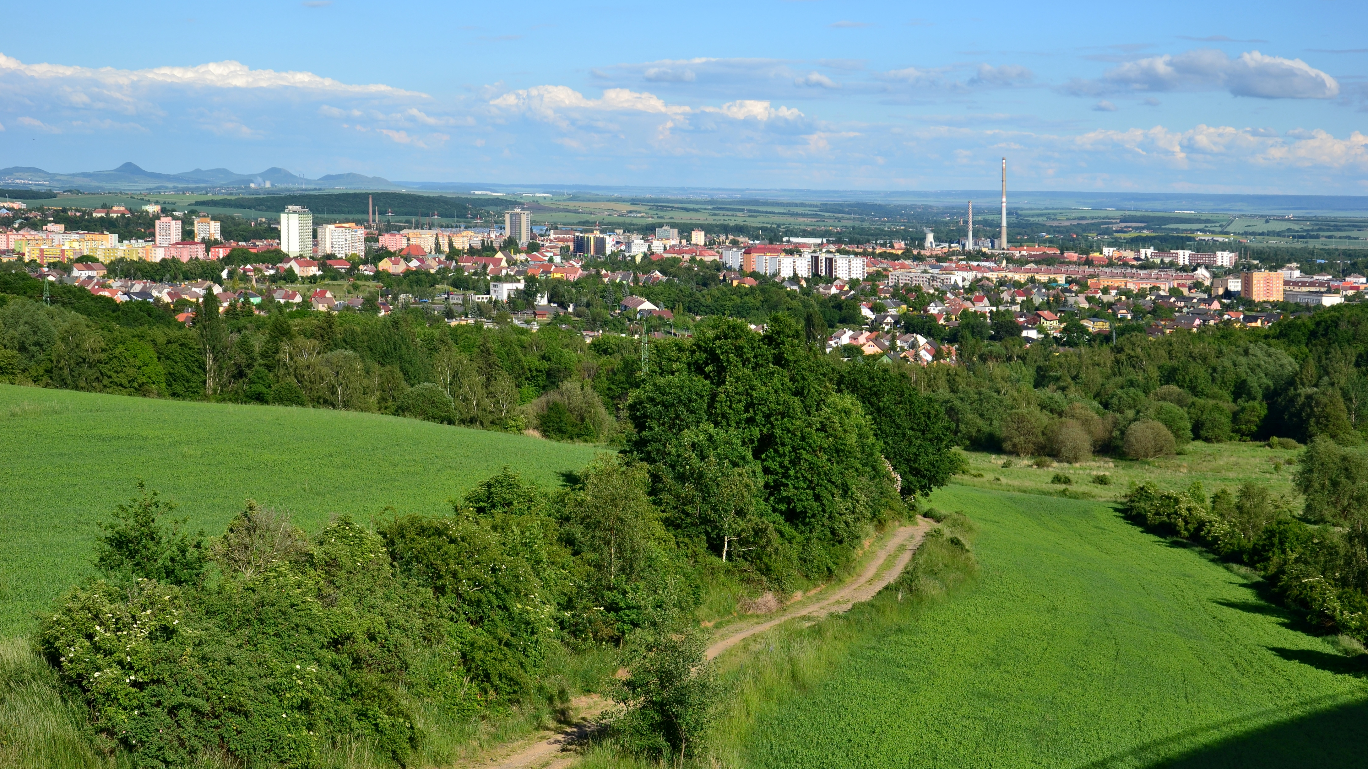 Celkový pohled na centrum města